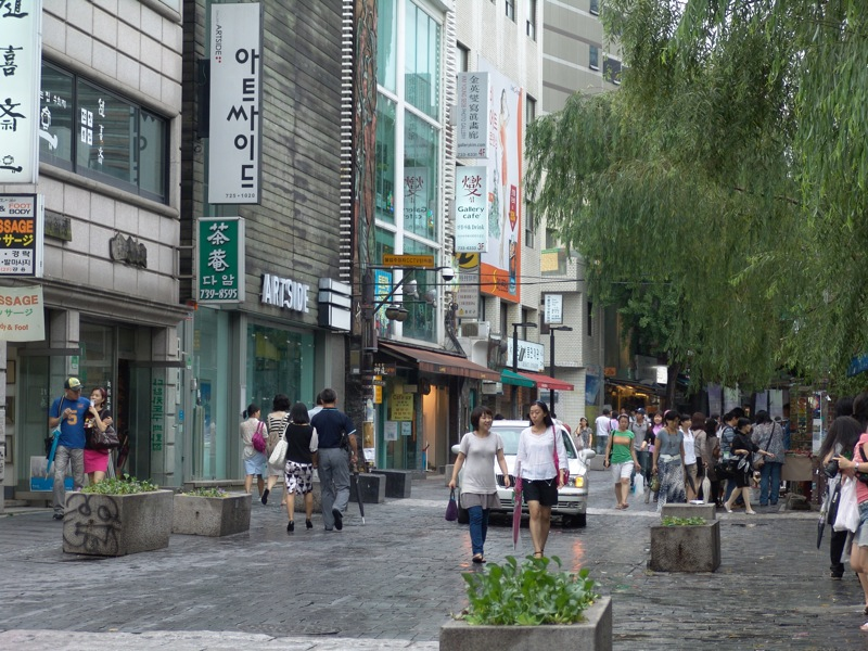 Insadong in Seoul, Korea